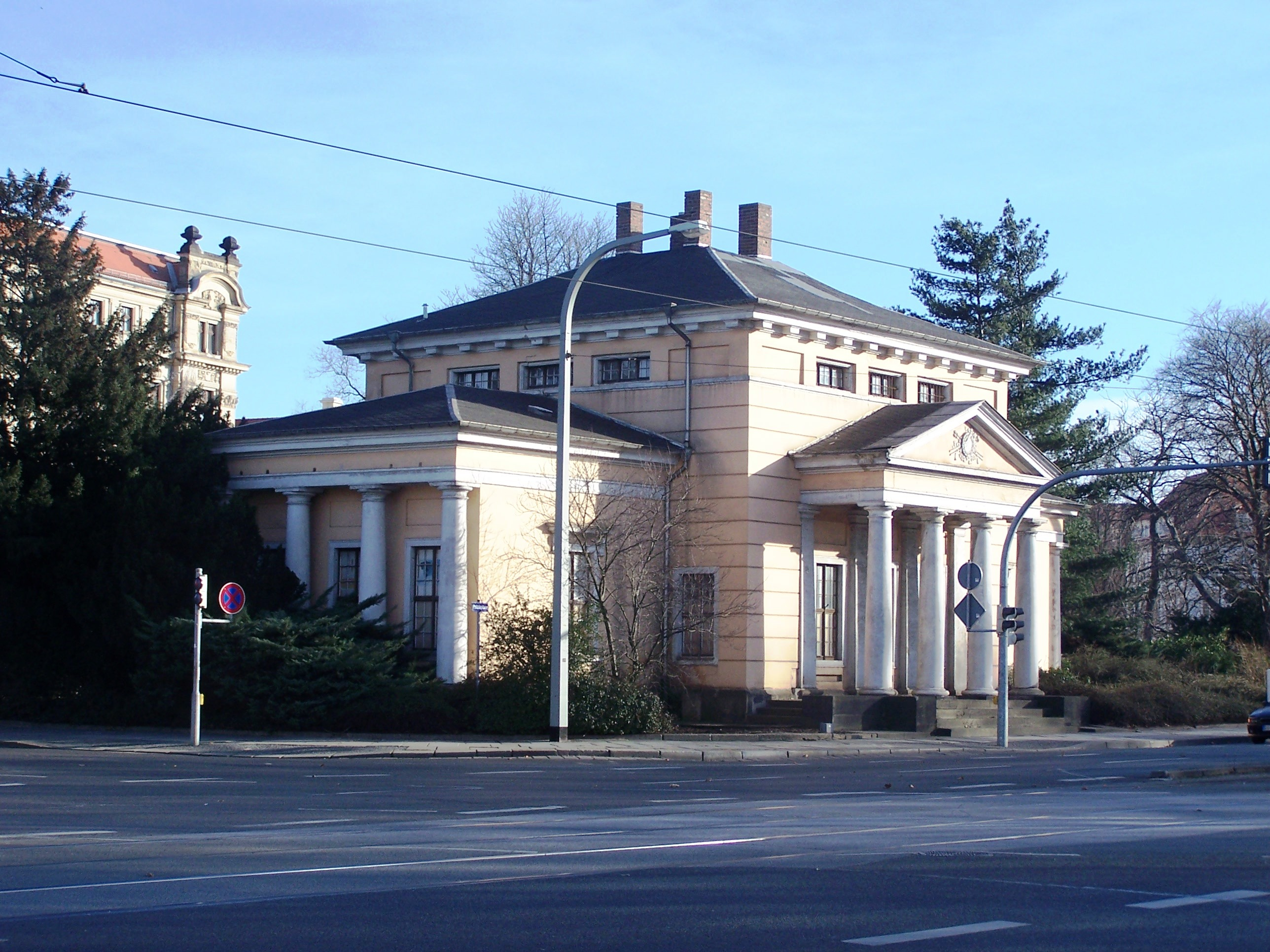 Von G. F. Thormeyer errichtetes Akzisehaus/Torhaus am Dresdner Palaisplatz